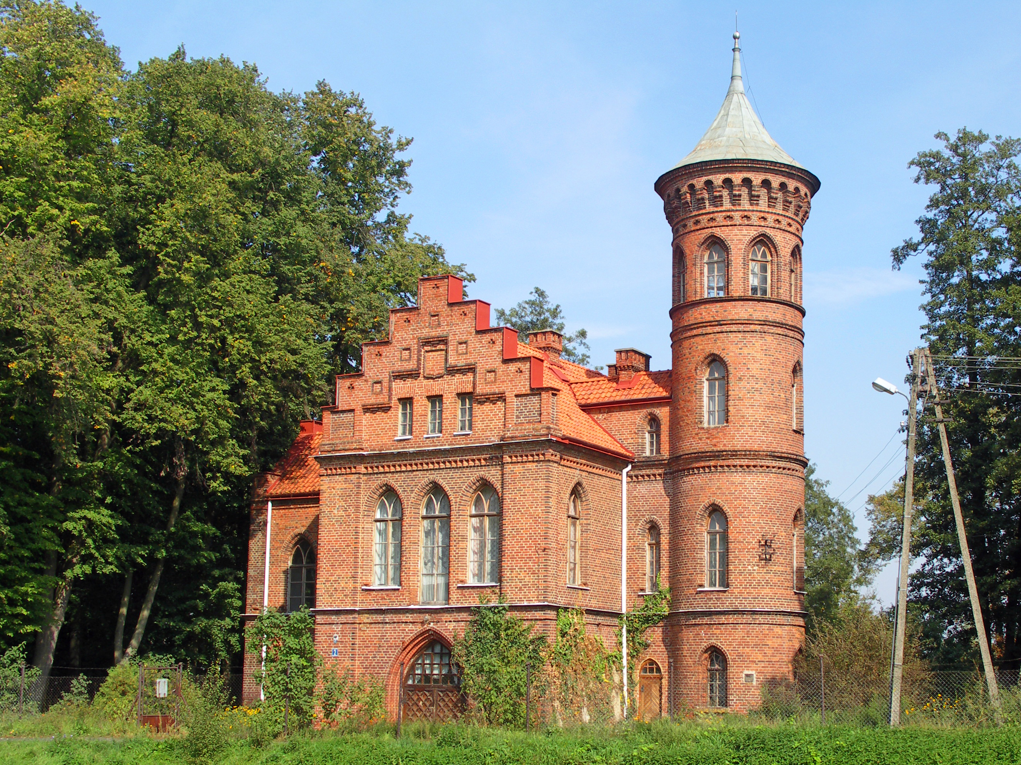 Neugotisches Schloss in Nowy Duninów